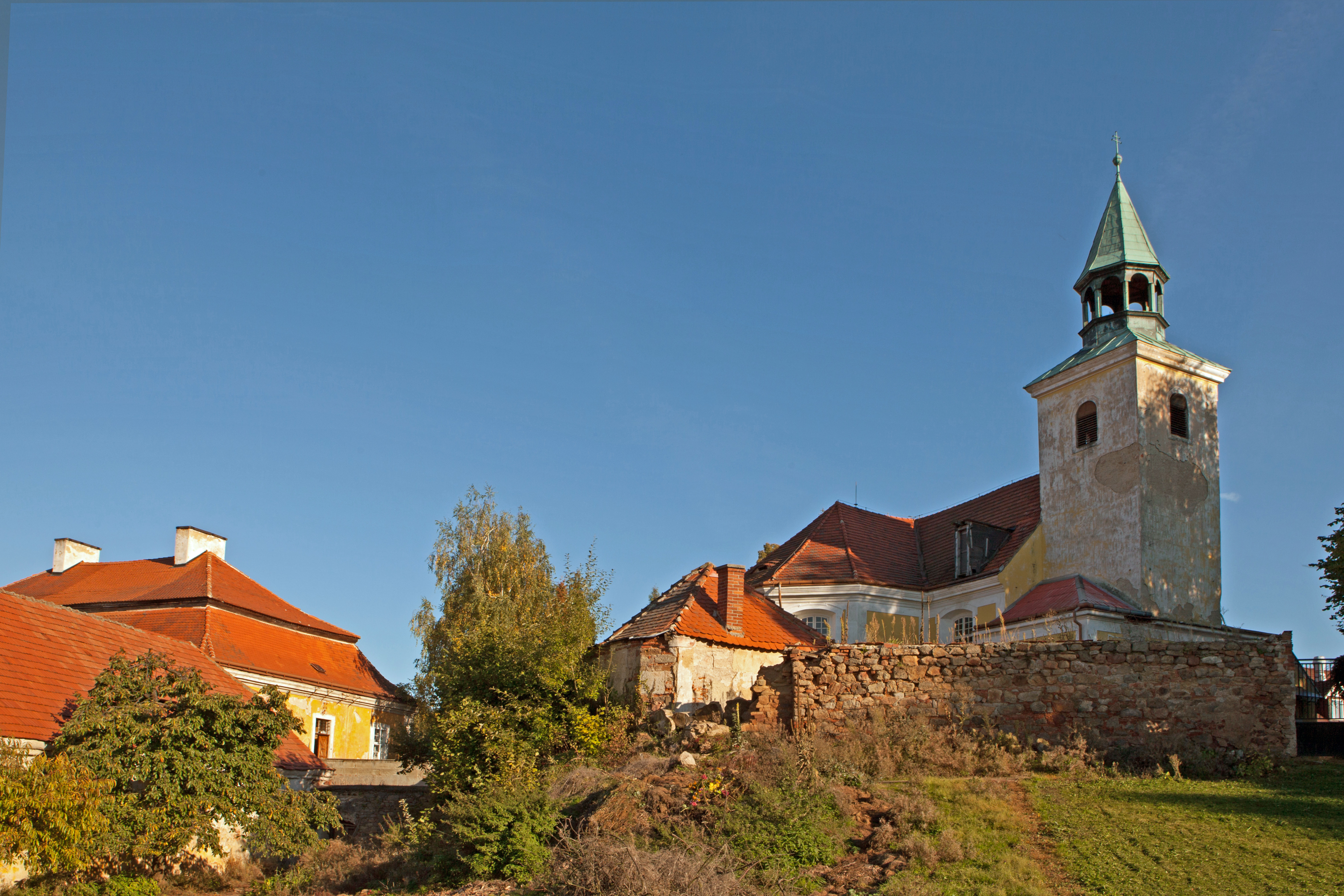 Kostel sv. Petra a Pavla (Jesenice), SZ část vsi, Jesenice